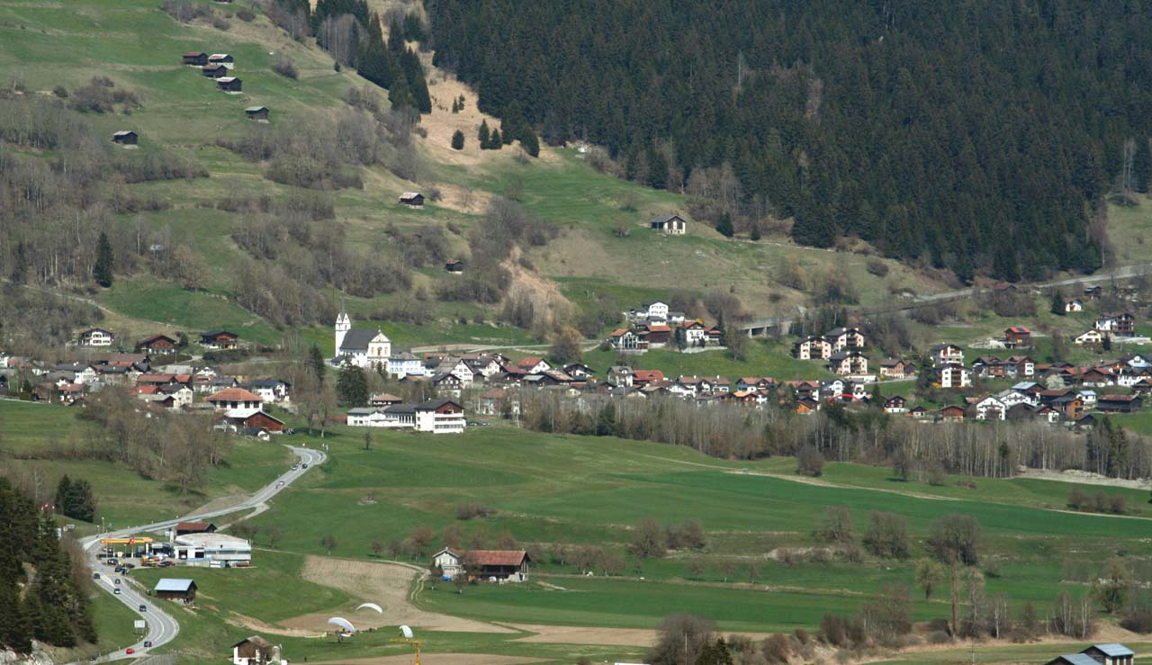 Schluein